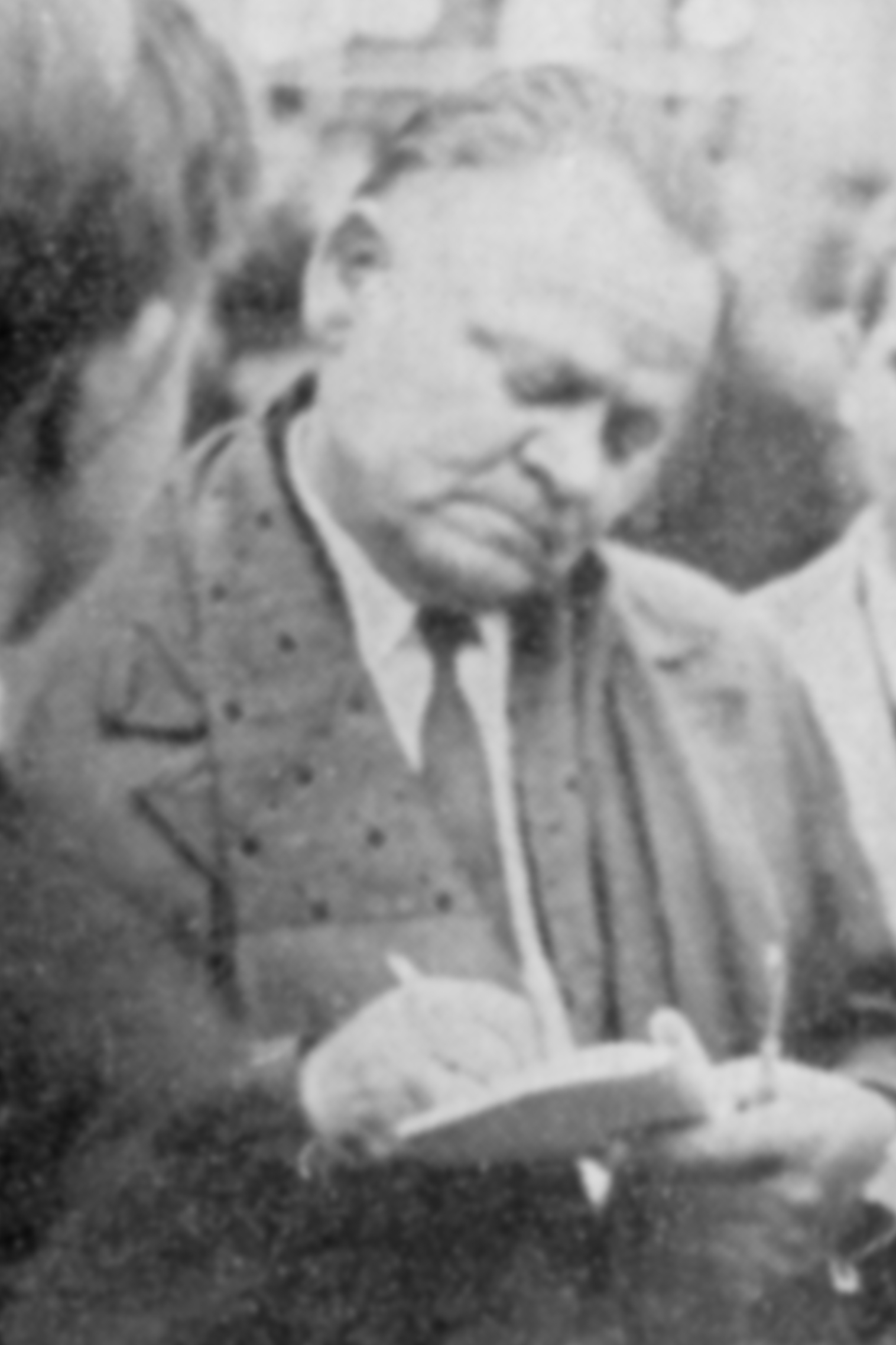 Stanisław Ryszard Dobrowolski (1907–1985) polski pisarz, zdjęcie wykonane prawdopodobnie podczas składania autografu i/lub dedykacji podczas jednych z Rybnickich Dni Literatury